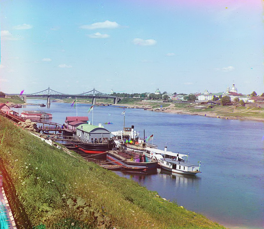 Волга в Твери, 1910 год